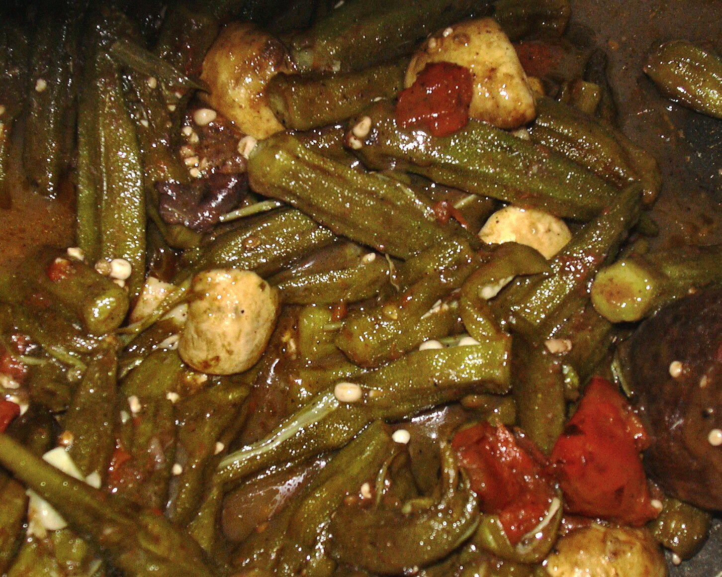 plat de gombos